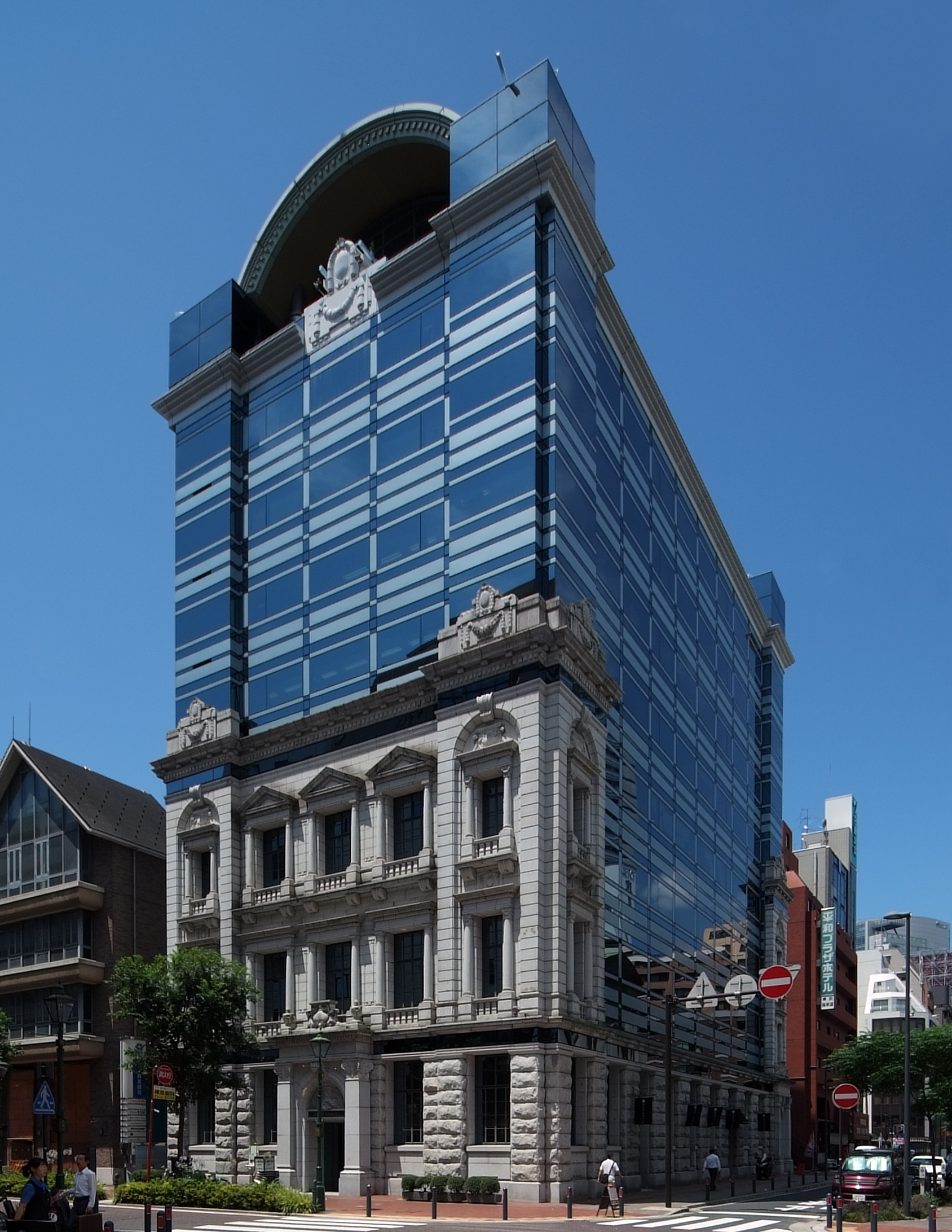 NIPPONKOA Insurance Co_Bashamichi bldg, Naka-ku Yokohama Japan.